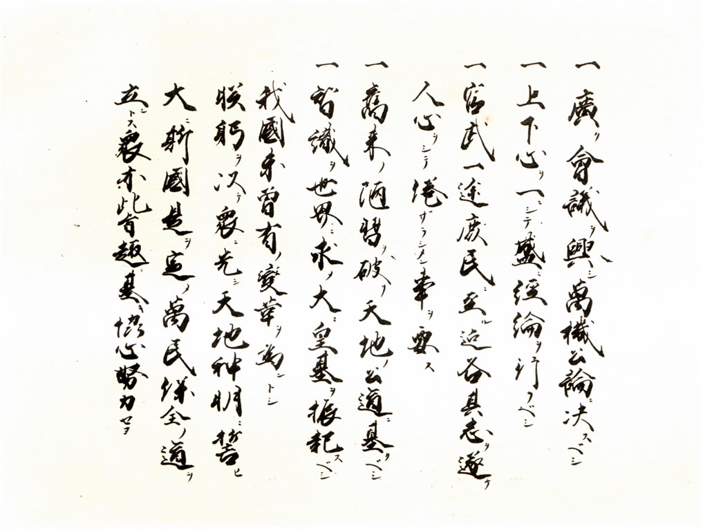 明治元年3月13日（旧暦）、明治天皇の勅命によって有栖川宮幟仁親王が揮毫した五箇条の御誓文の原本。撮影日・撮影者とも不明。 「高松宮蔵版 幟仁親王行實」（1933年出版）より引用。年代より著作権切れと判断。